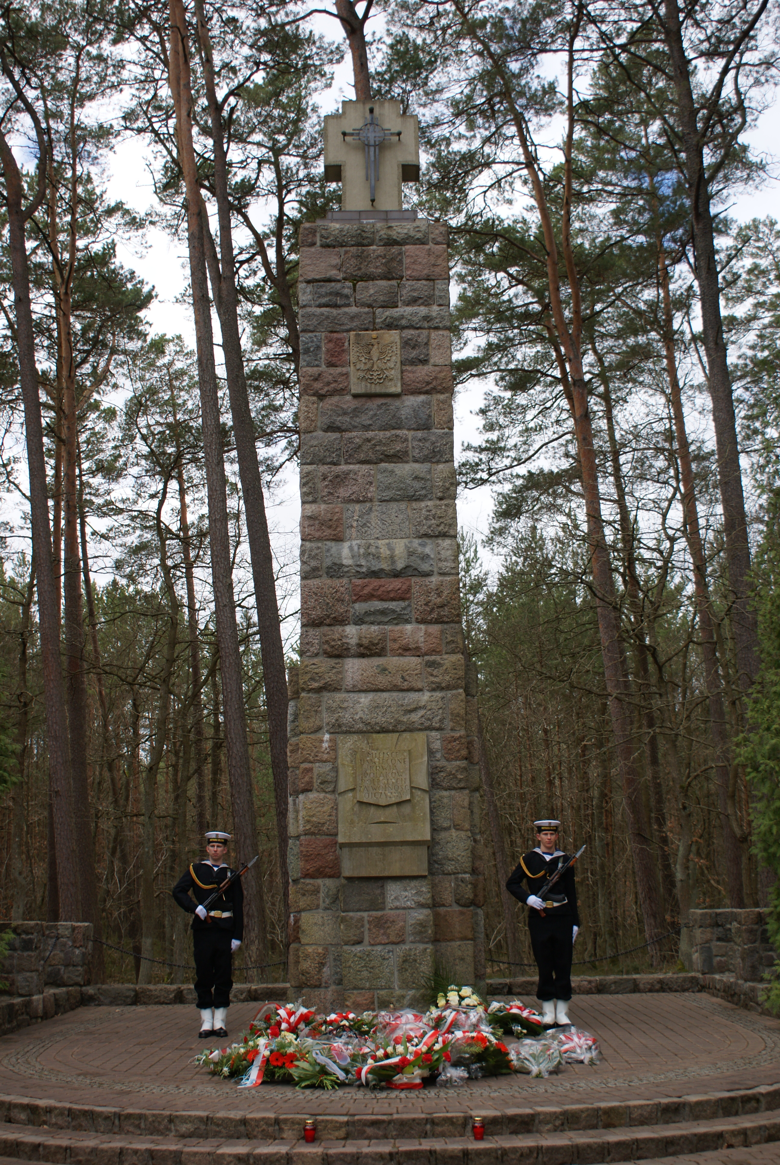 Pomnik Ofiar Piaśnicy z 1955, znajdujący się w lesie piaśnickim pod Wejherowem.